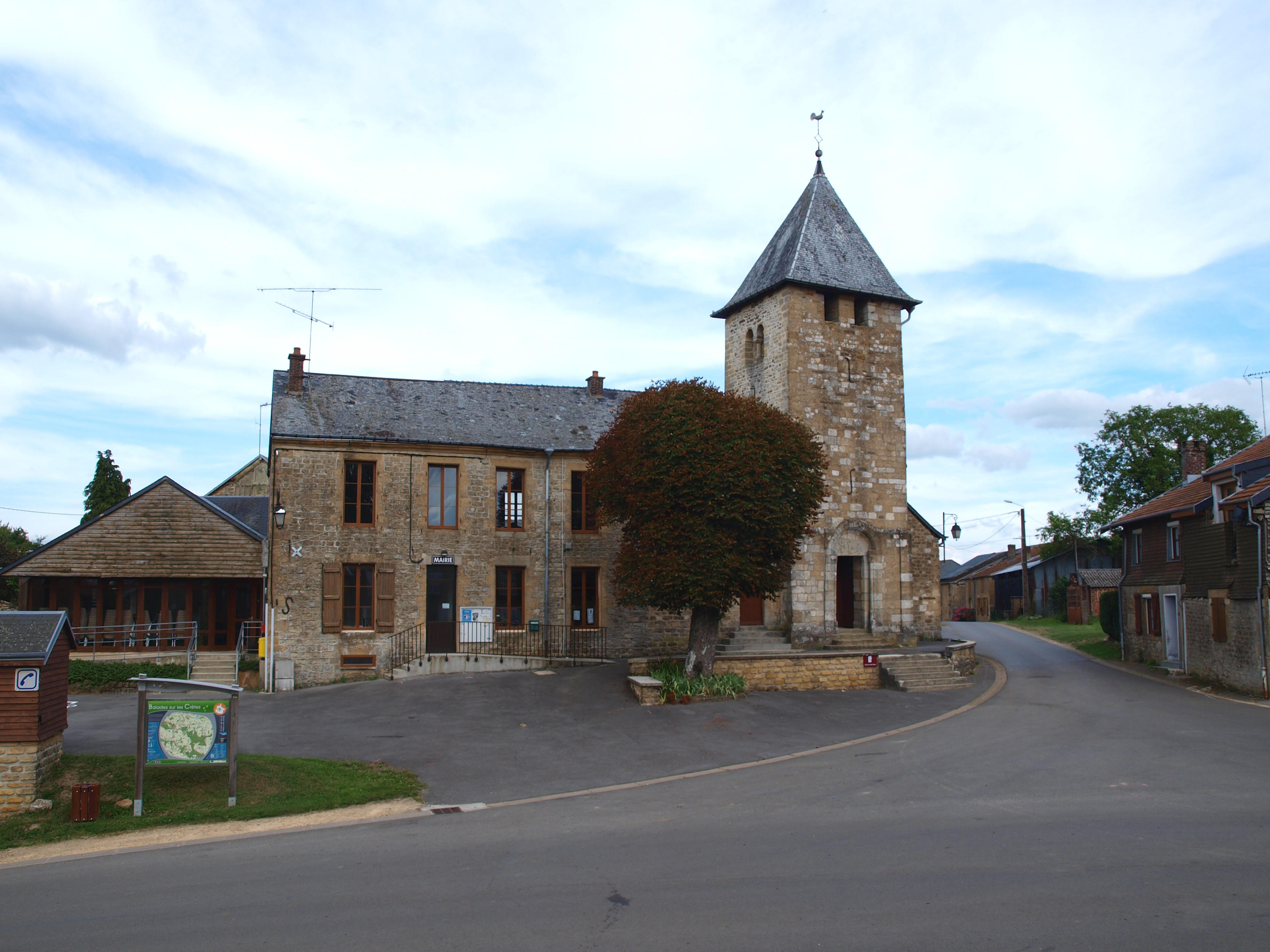 Baâlons (Ardennes, France) ; le groupe mairie + école + église